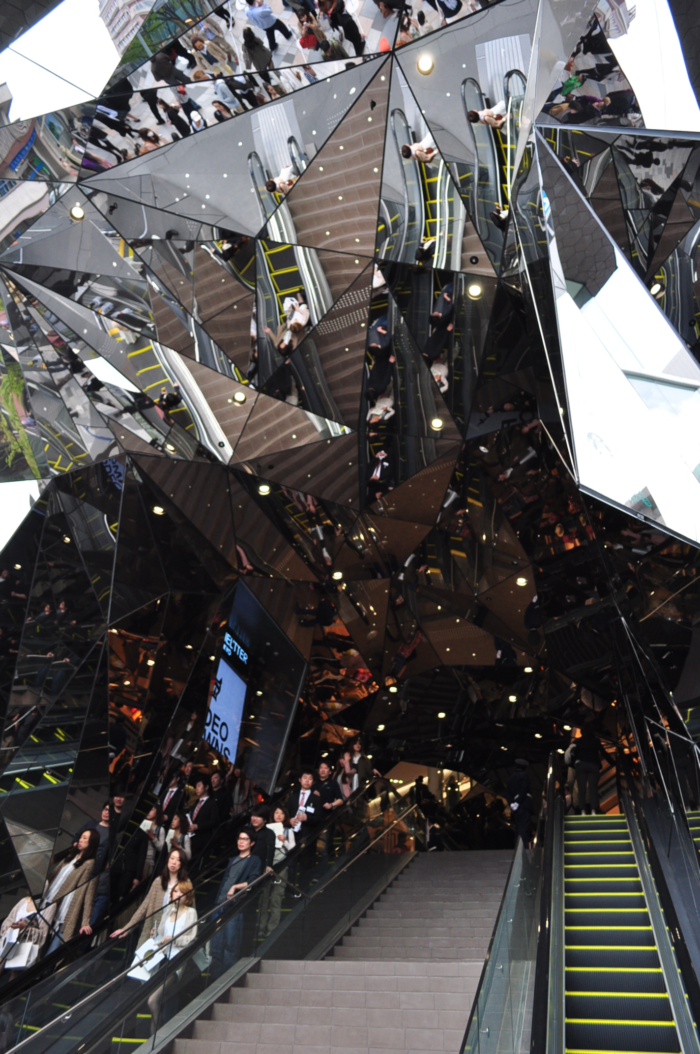 東急プラザ表参道原宿の入り口